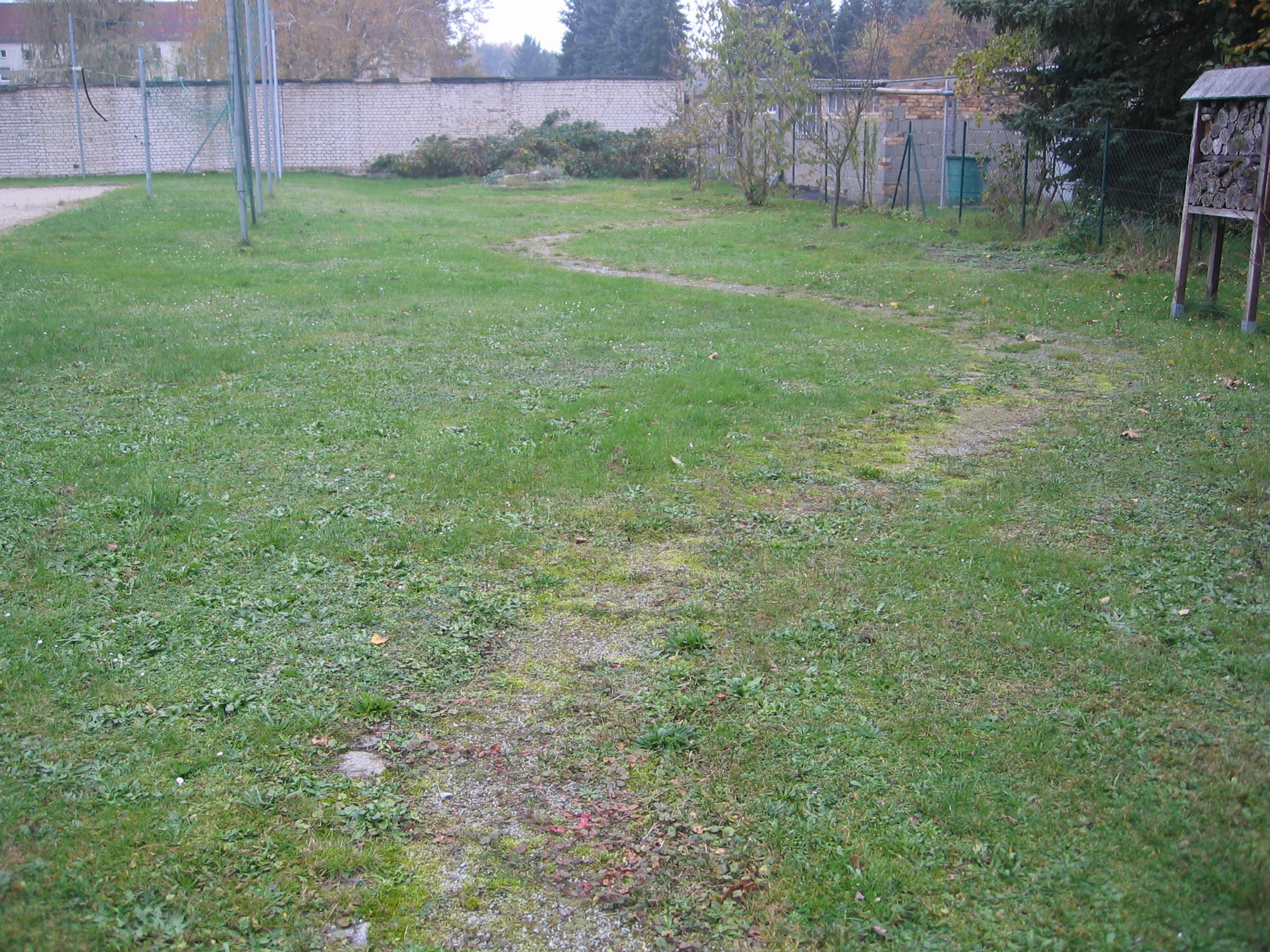 Ruhland, Ortrander Straße, Gartenteil hinter dem Basketballplatz an der Turnhalle (Ersatz für den Schulgarten der Geschwister-Scholl-Schule) hinter der Turnhalle, Weg vom Sitzplaz zur Kräuterspirale, rechts Insektenhotel; hinten Brombeerhecke, links der Volleyballplatz